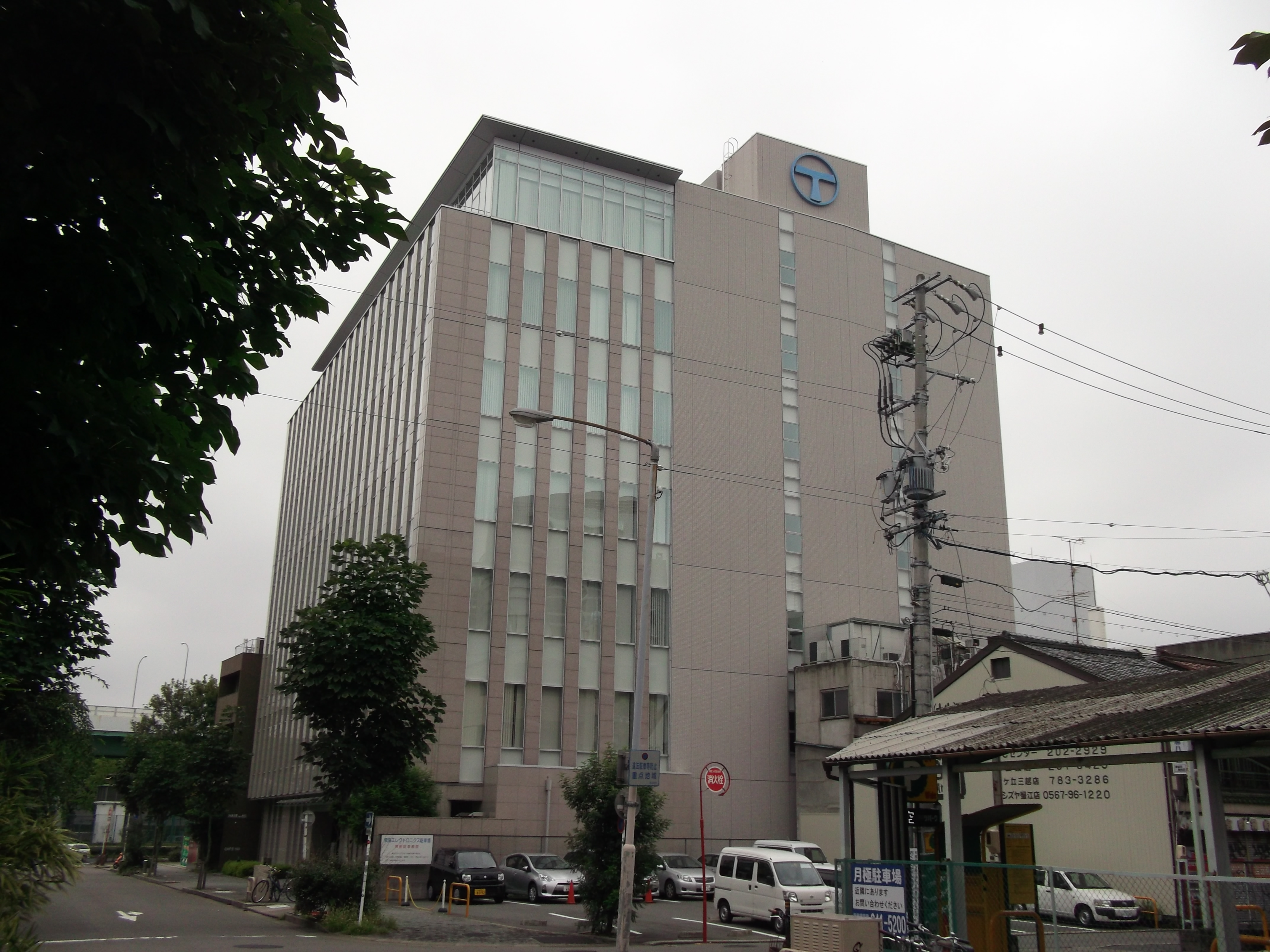 名古屋市中区栄三丁目の東海エレクトロニクス本社を東側公道北側より撮影